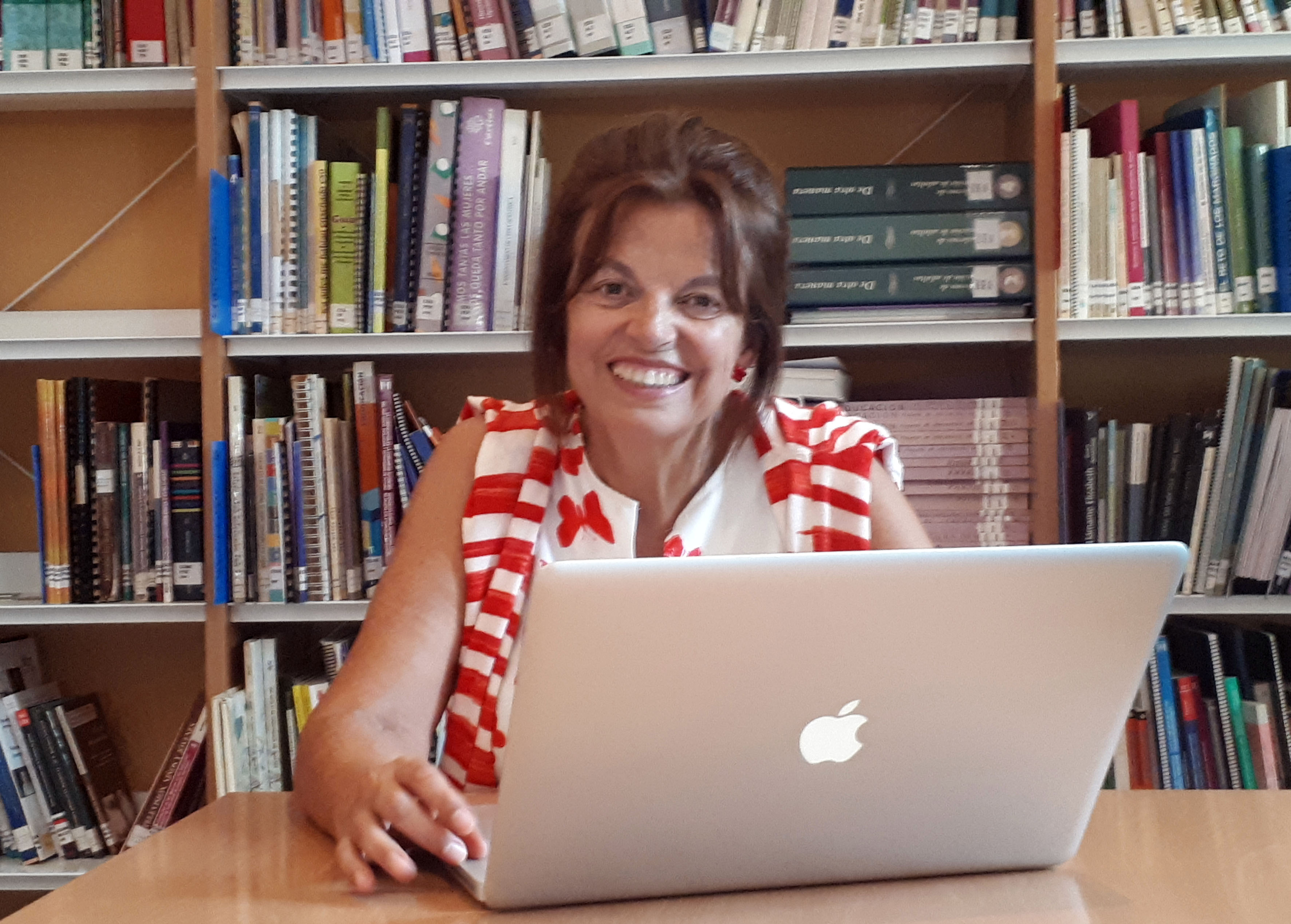 Chis, Mercedes Oliveira Malvar no Centro de Documentación feminista